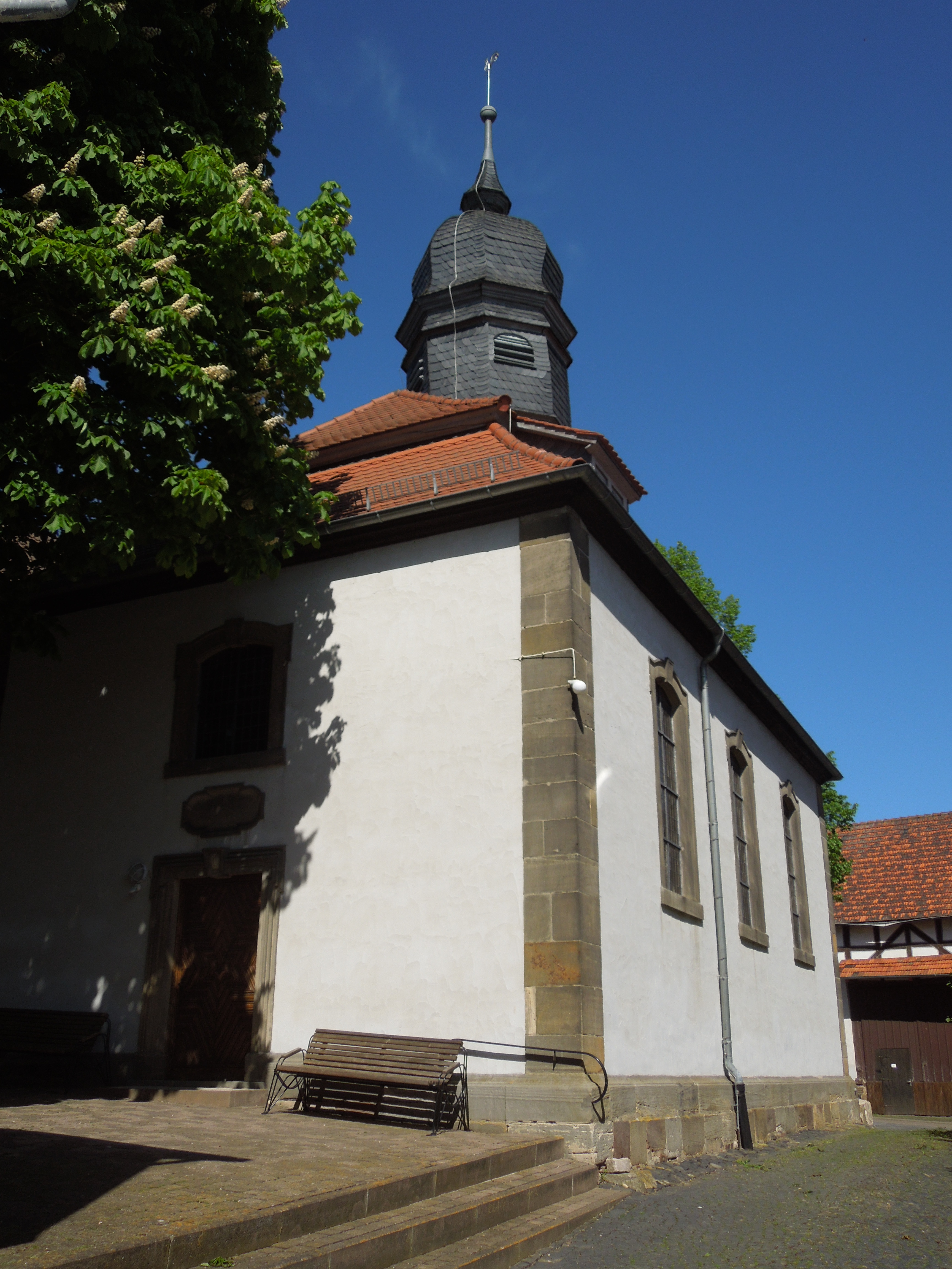 Die evangelische Dorfkirche im Gudensberger Stadtteil Dorla